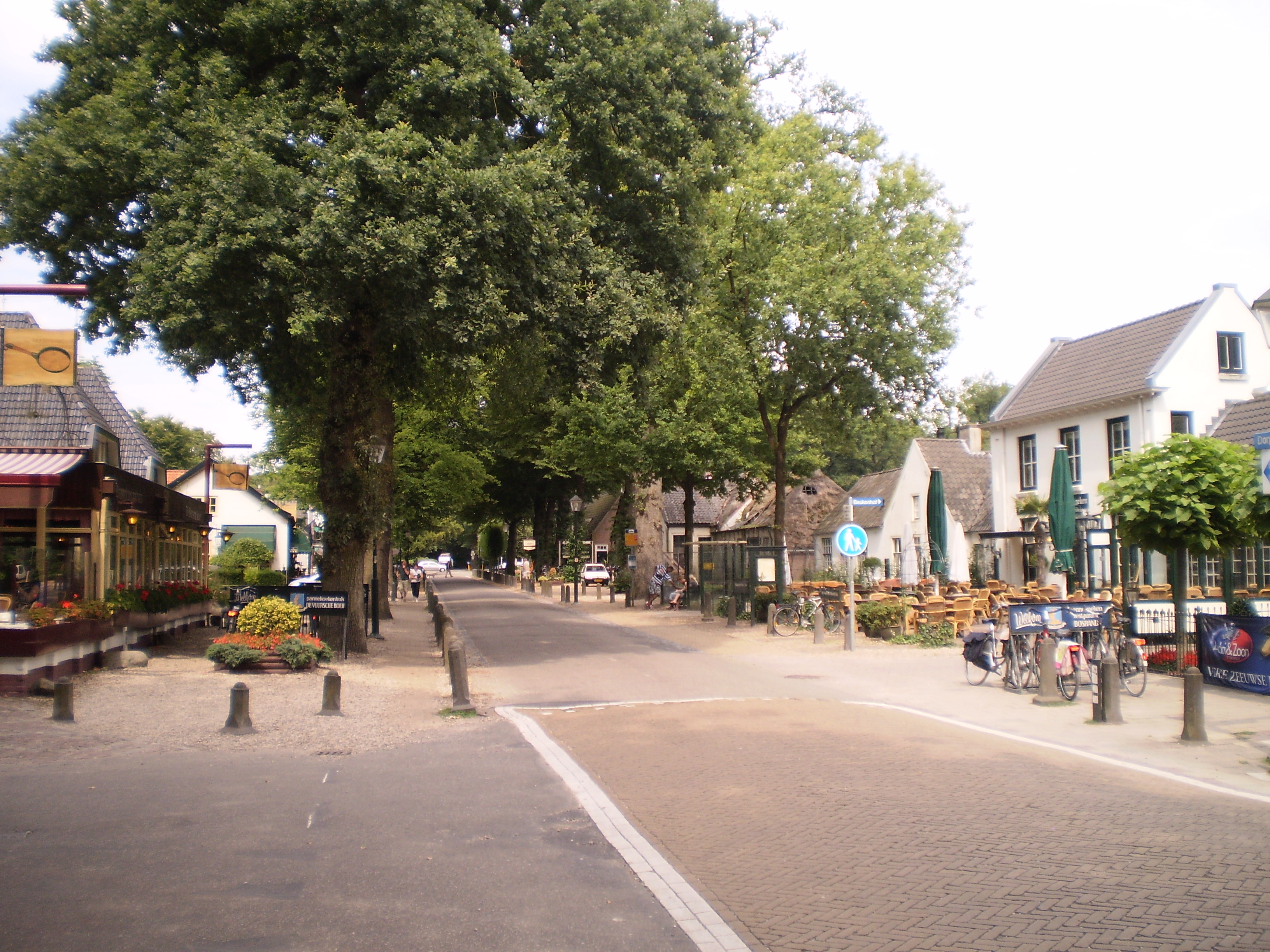 Buorren fan Lage Vuursche